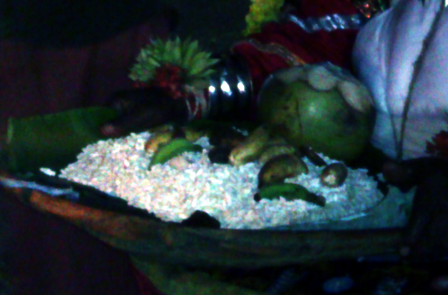 ಕನ್ನಡ: ಭೂತೊ ಬಾರಣೆ